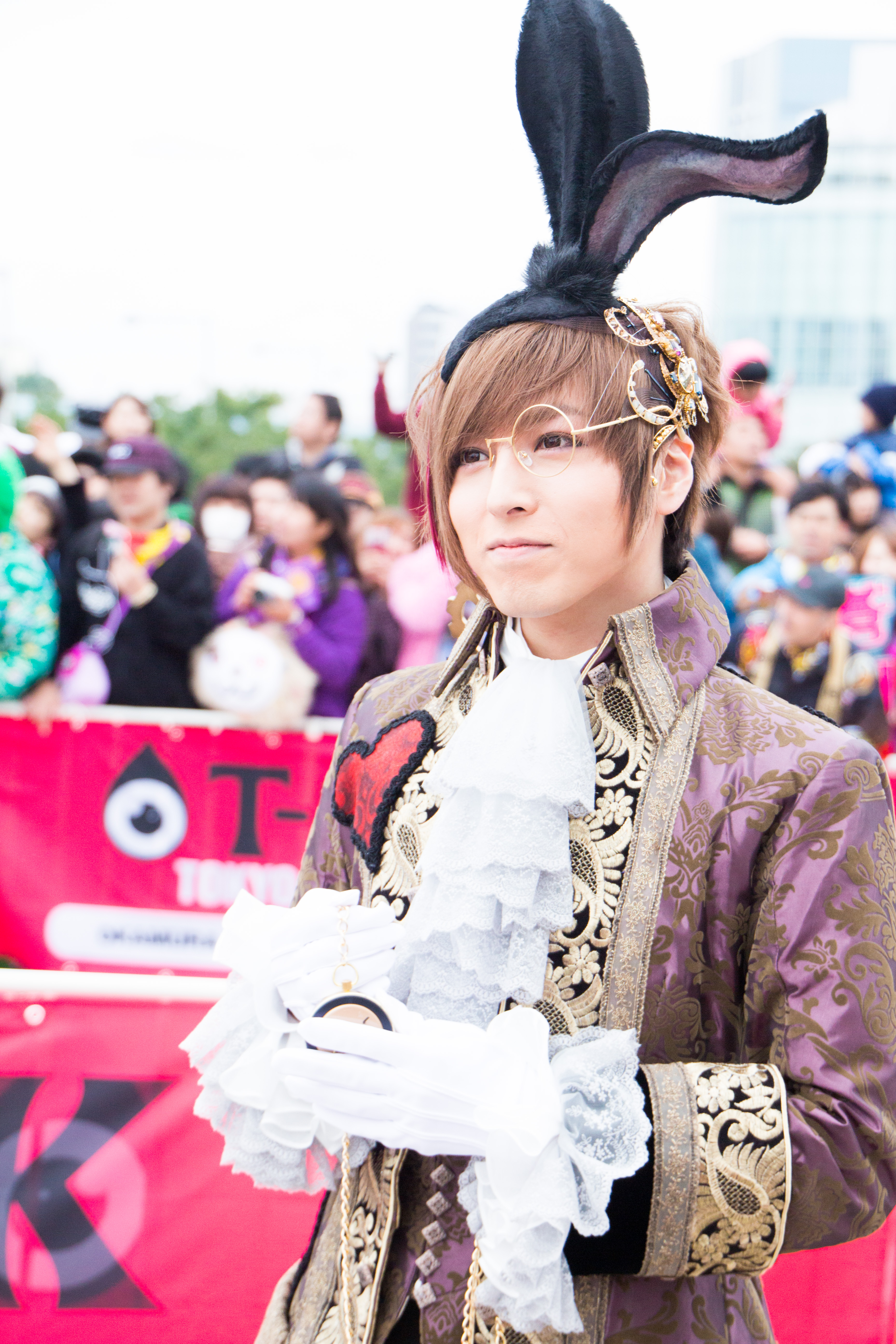 T-SPOOK 2016 蒼井翔太